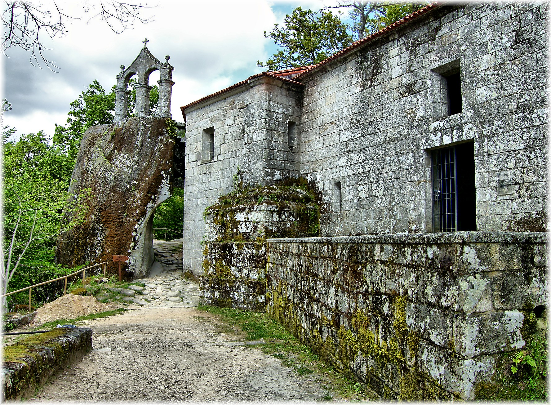 Mosteiro Eremitario do Seculo VI, e a xoia da Ribeira Sacra escabado na Roca. Encontrase no concello de Esgos (Ourense). San Pedro de Rocas (Esgos, Galiza)